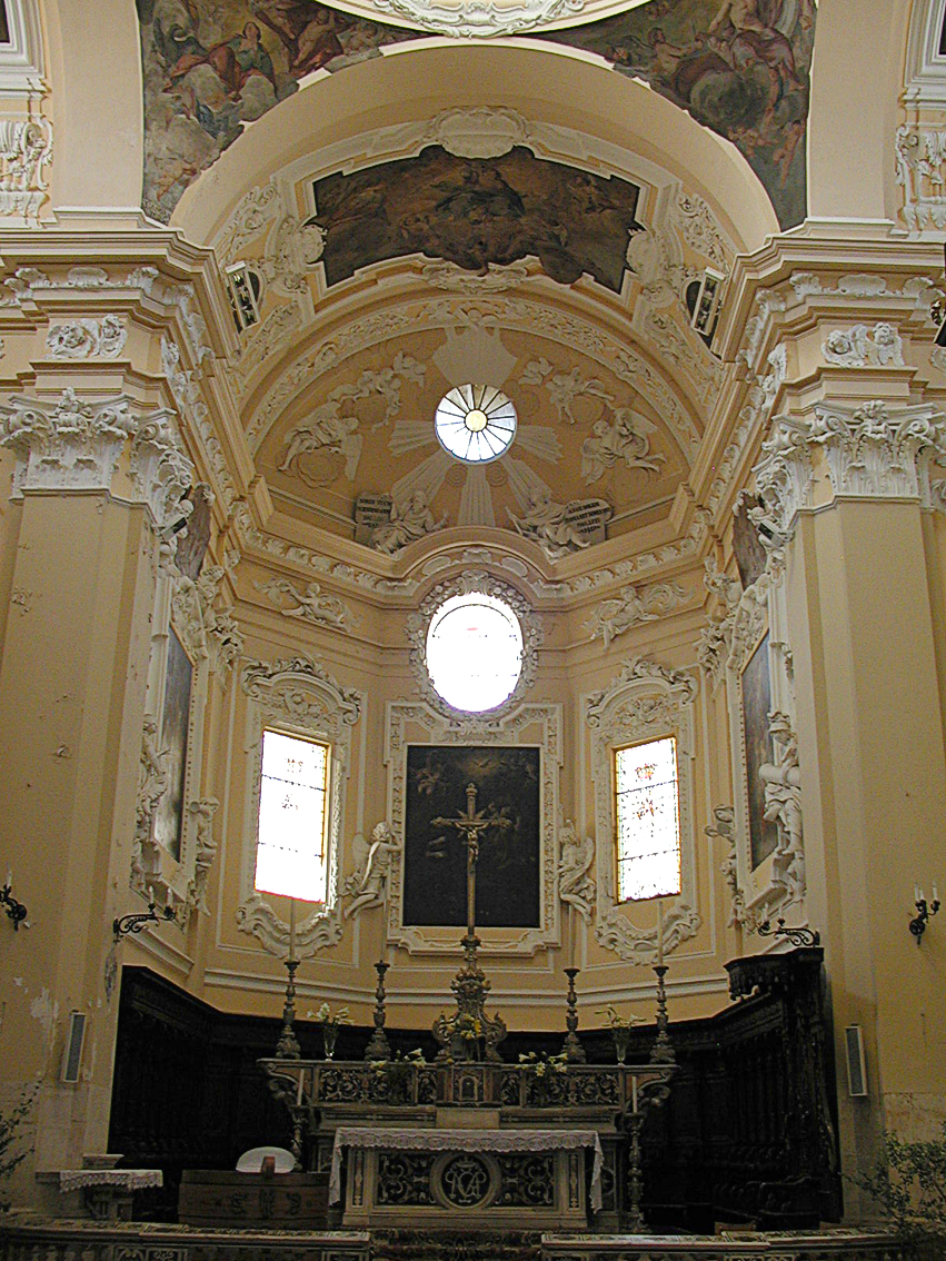 Chiesa della SS. Annunziata